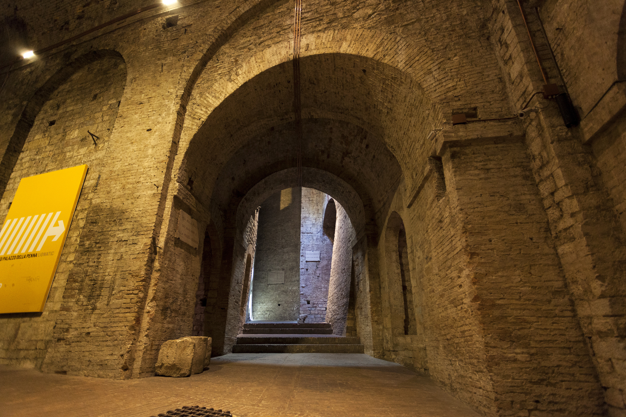 Rocca Paolina This is a photo of a monument which is part of cultural heritage of Italy.